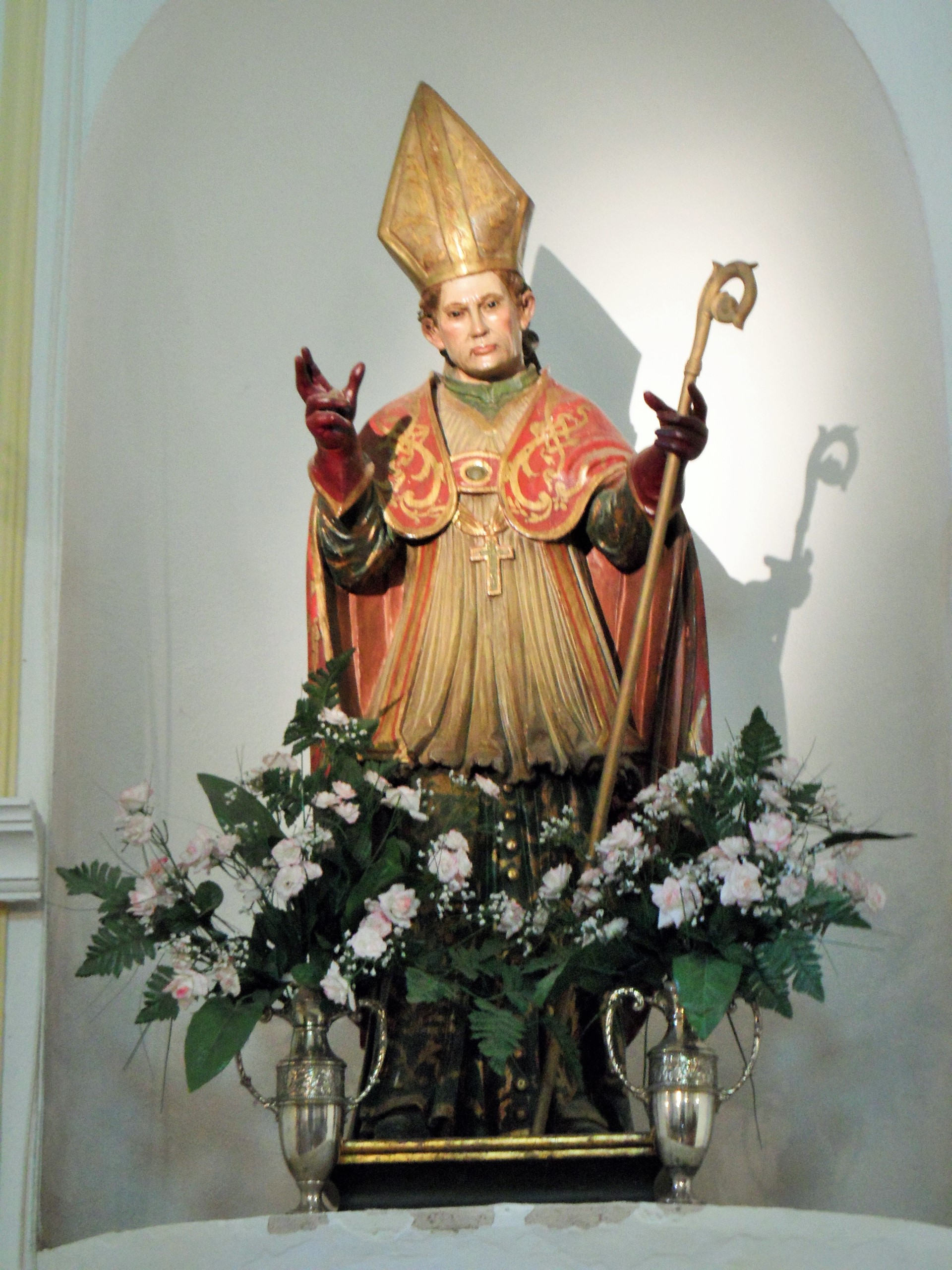 San Blas. Patron de Bodonal de la Sierra.